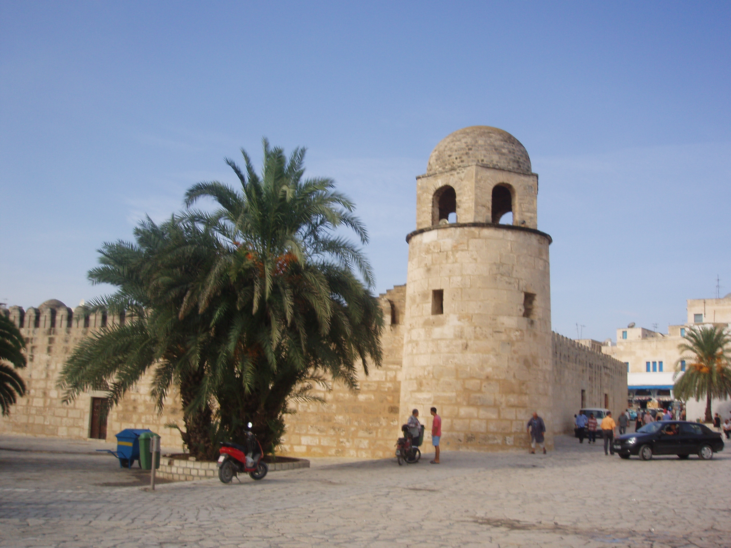 Mosque in Sousse, Tunis